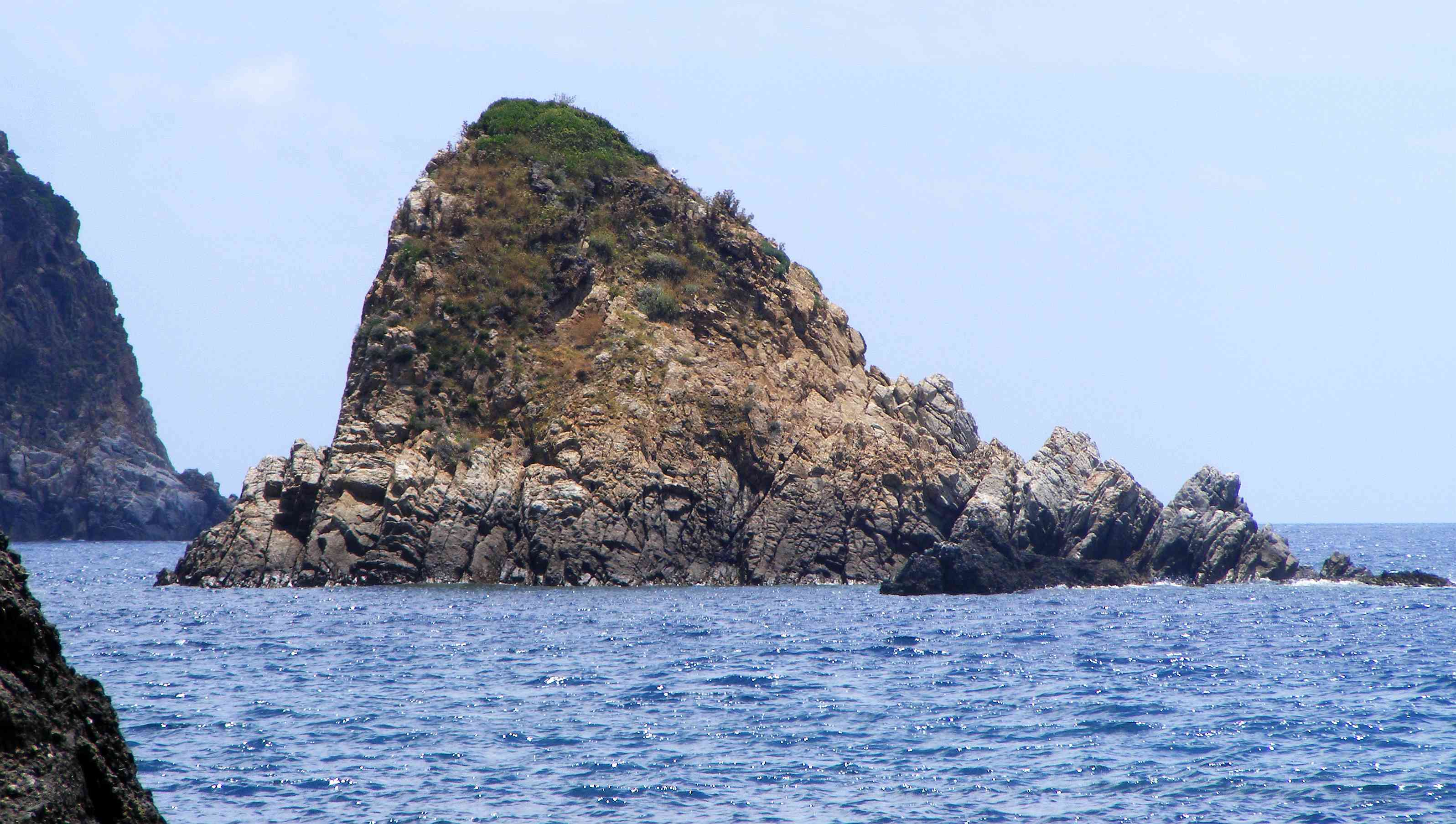 L'isola della Cappa vista dalla cala dell'Allume (comune di Isola del Giglio, GR) Unknown